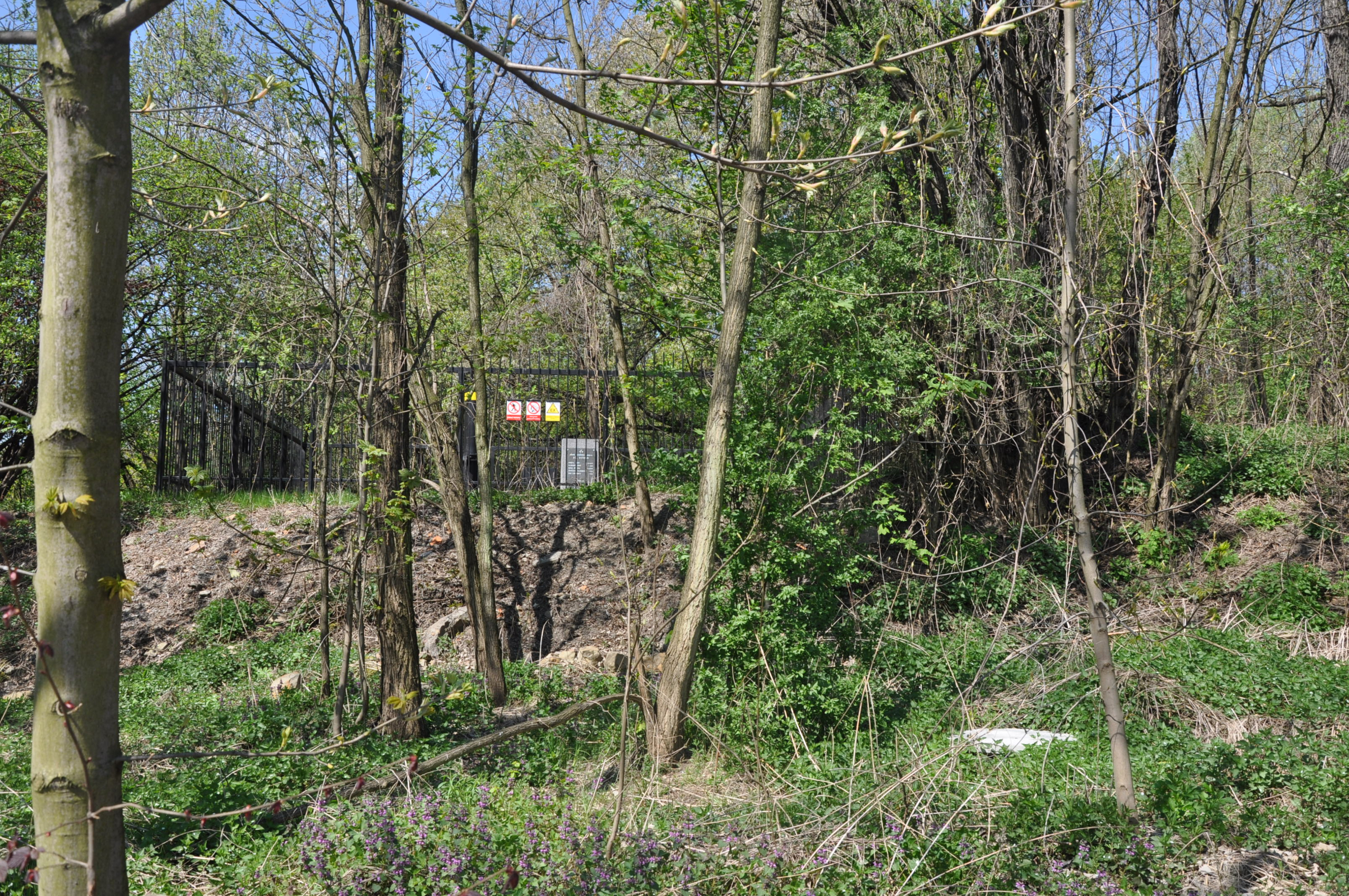 Jáma Bedřich, Slezská Ostrava